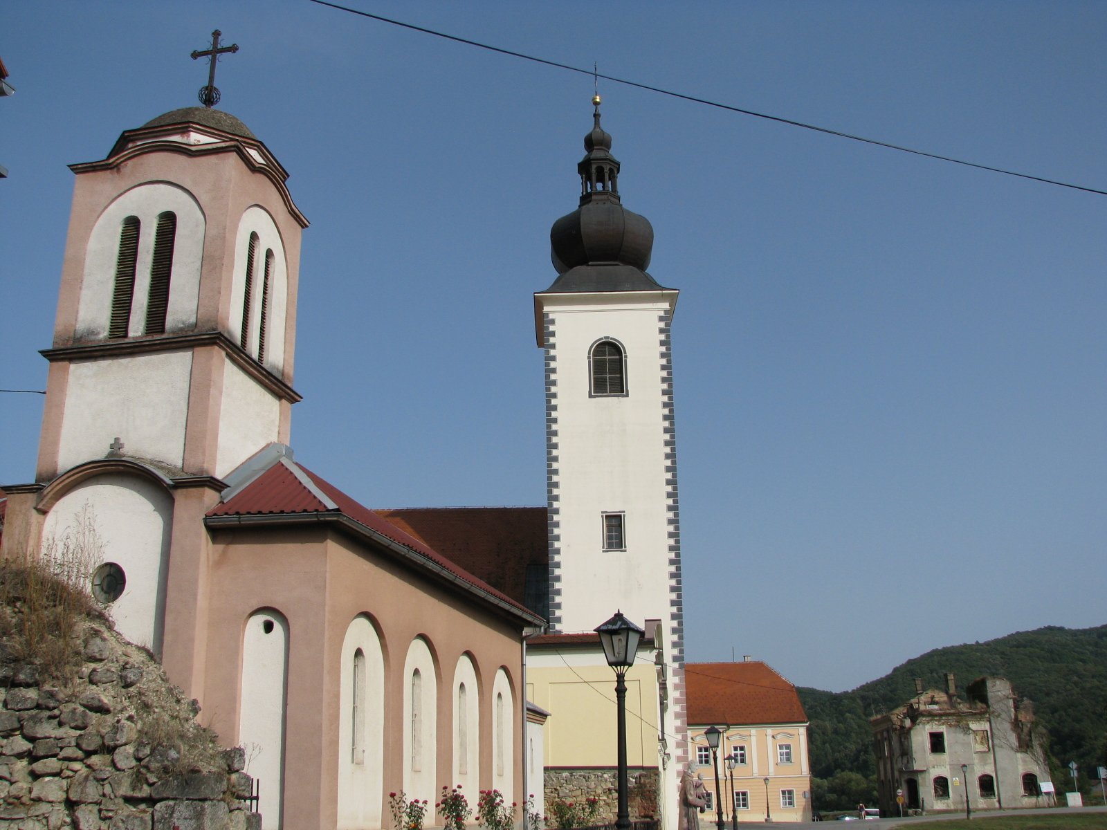 Hrvatska Kostajnica